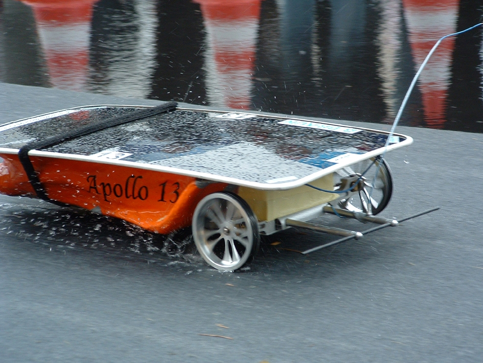 ferngelenkten Solar-Mobile bei Regen